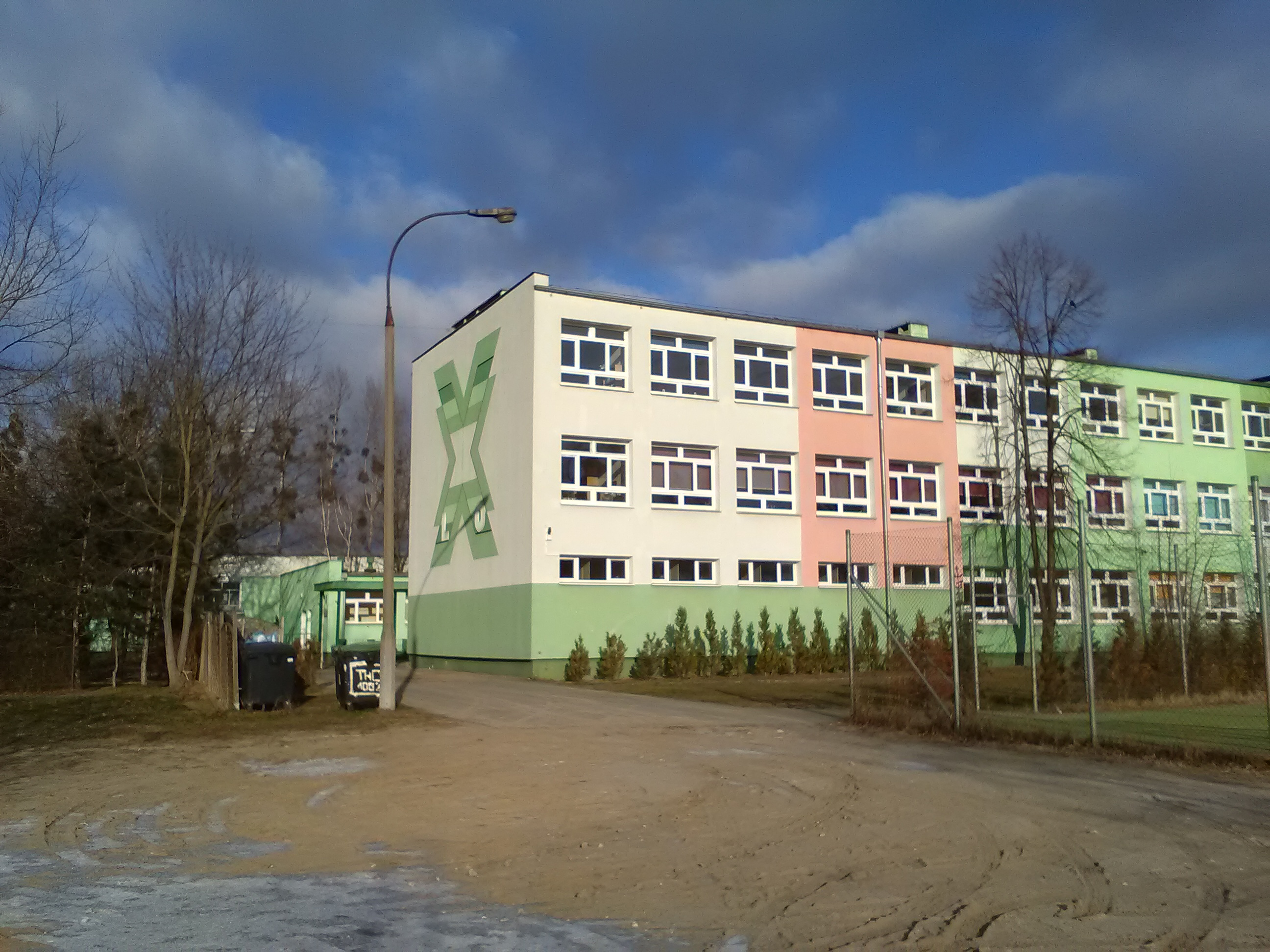 Osiedle Rzeczypospolitej w Poznaniu- Liceum ogólnokształcące X.